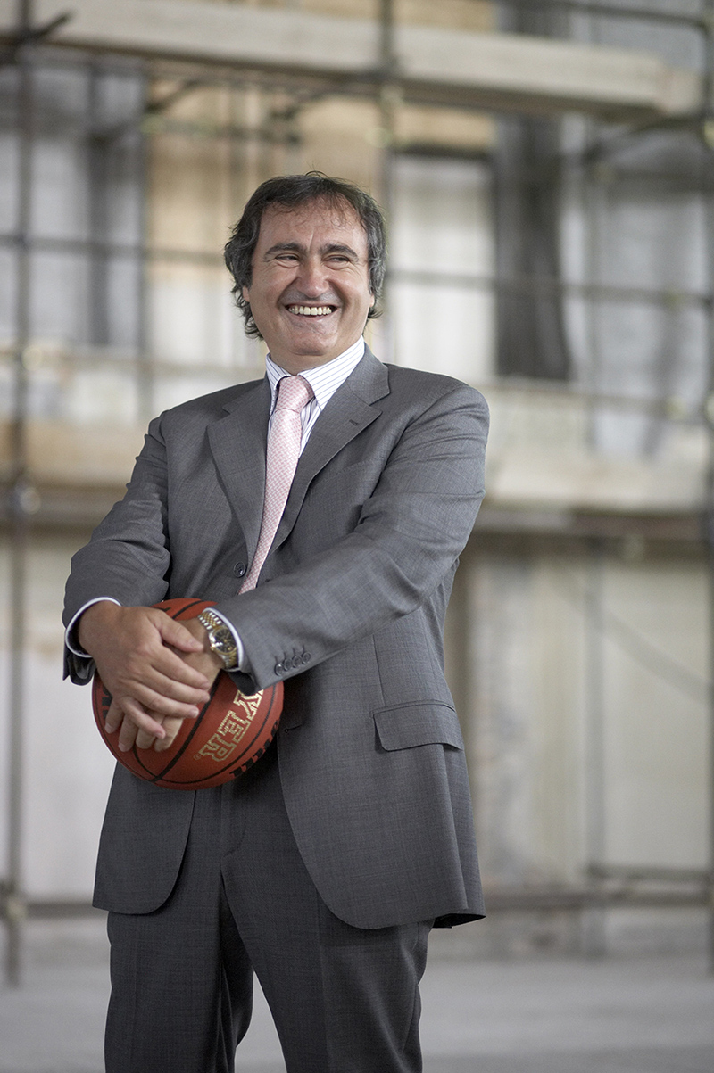 Lugi Brugnaro nella sala capitolare della Misericordia di Venezia